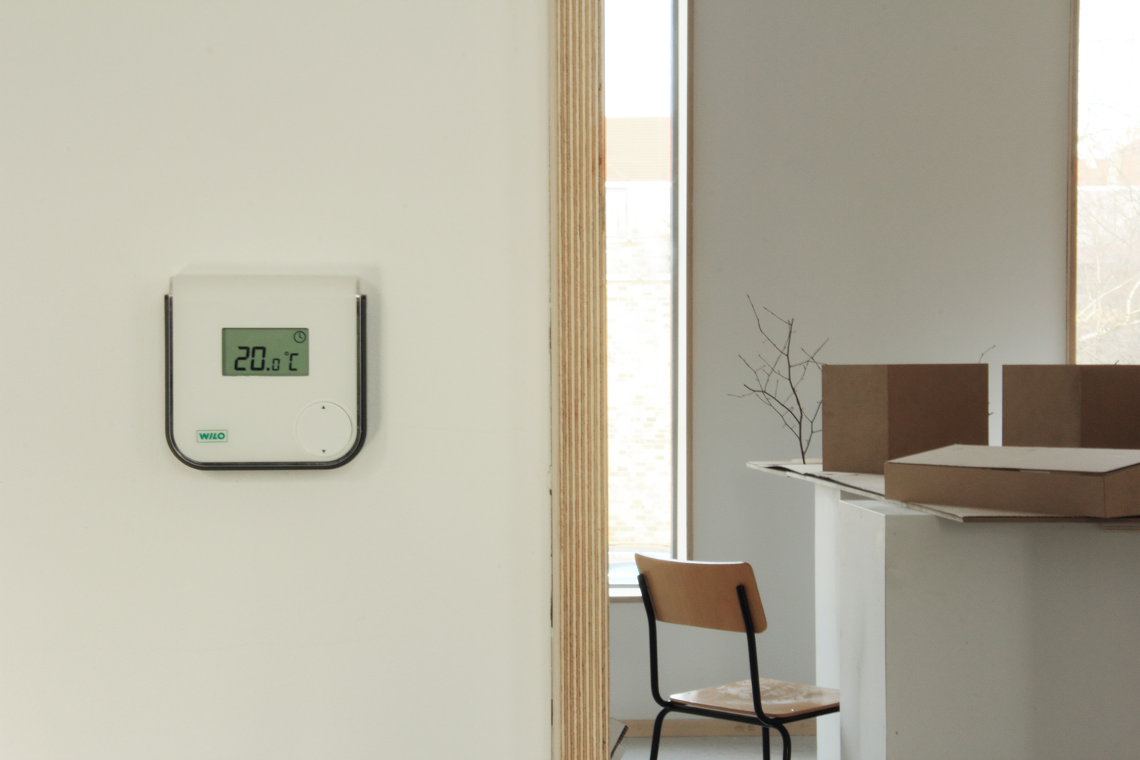 Nutzungseinheiten mit WILO Temperaturanzeige